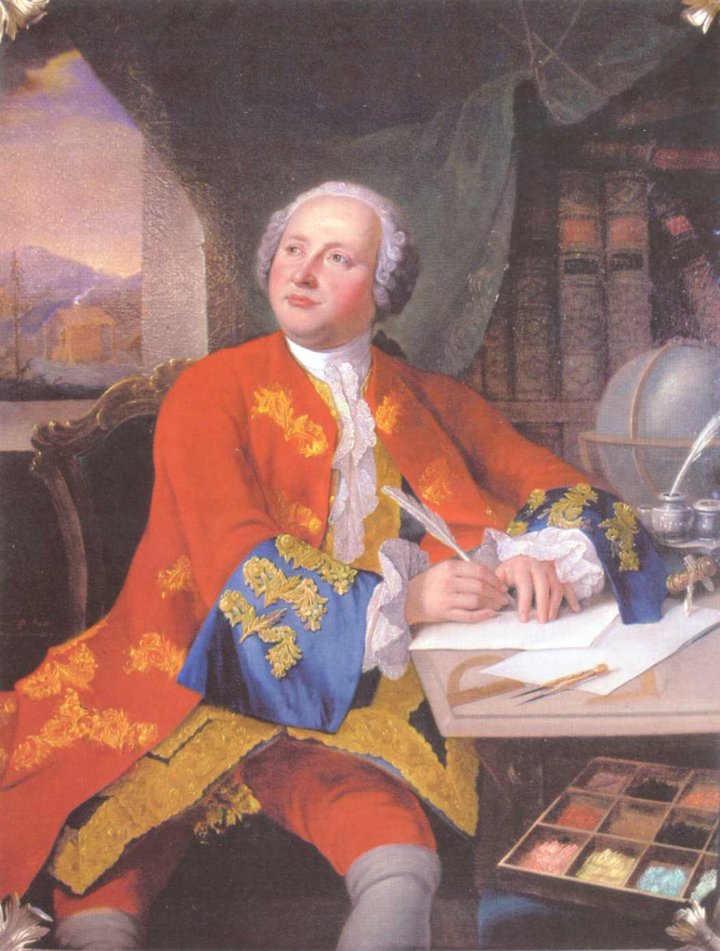 М.В.Ломоносов. Портрет середины 19 века. Холст, масло. Ф.Н.Рисс. Слева посередине: "пис. Ф. Риссъ съ оригиналънаго портрета". Середина XIX в. МГУ имени М.В. Ломоносова, ОРКиР НБ МГУ. Примечание: из подписи художника "съ оригинальнаго портрета", по-видимому, следует, что этим портретом была картина Г.К.Преннера, выполненная им в 1755 году и хранившаяся у потомков М.В.Ломоносова. Местонахождение портрета после 1917 года неизвестно. Источник: Каталог художественных произведений с изображениями Михаила Васильевича Ломоносова из собрания Московского университета. / Сост. Е.В.Зименко, Г.А.Широкова. Под ред. А.П.Лободанова. — М.: Издательство Московского университета, 2011. — 88 с.